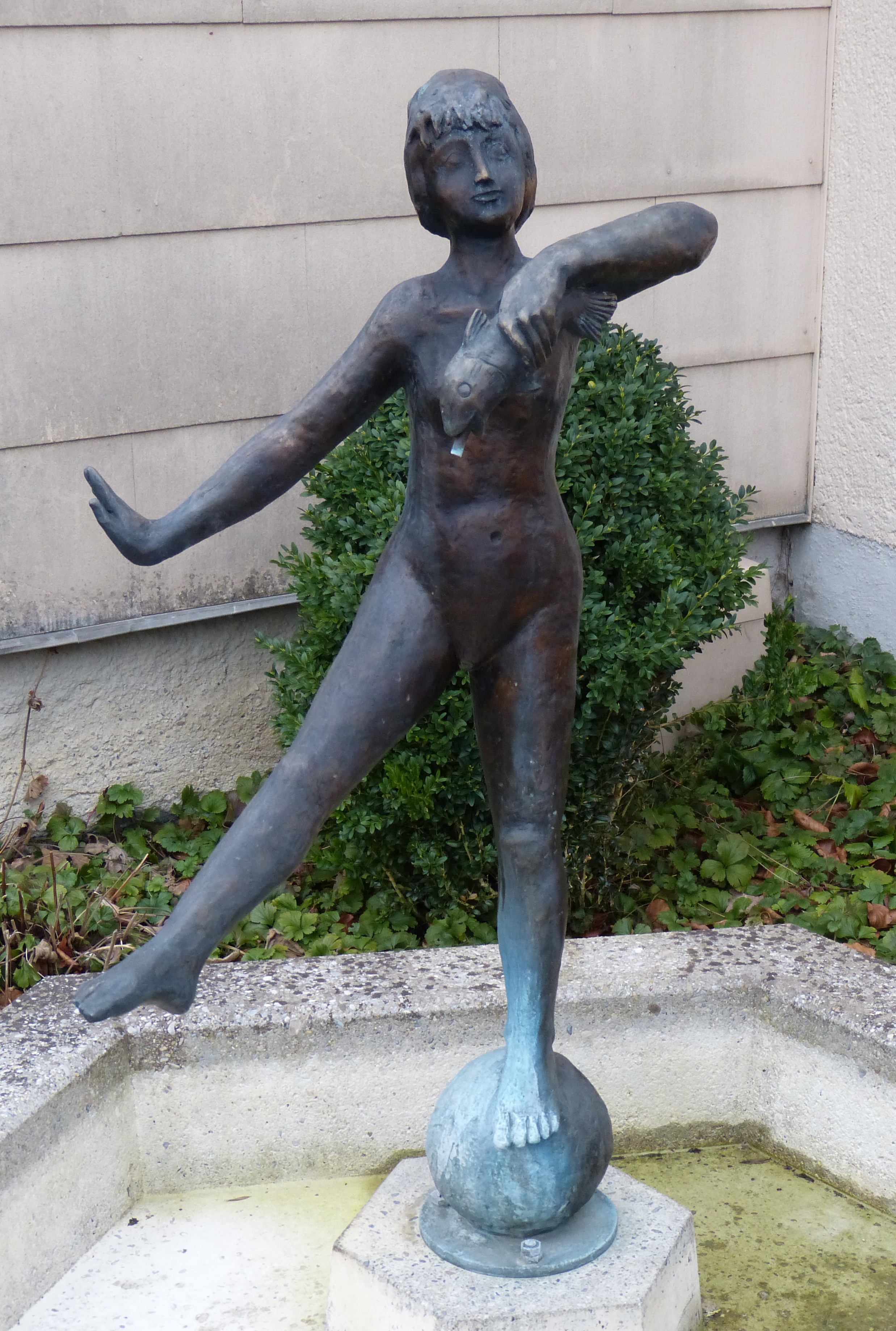 Brunnenfigur (Bronze) von Christian Angerbauer.